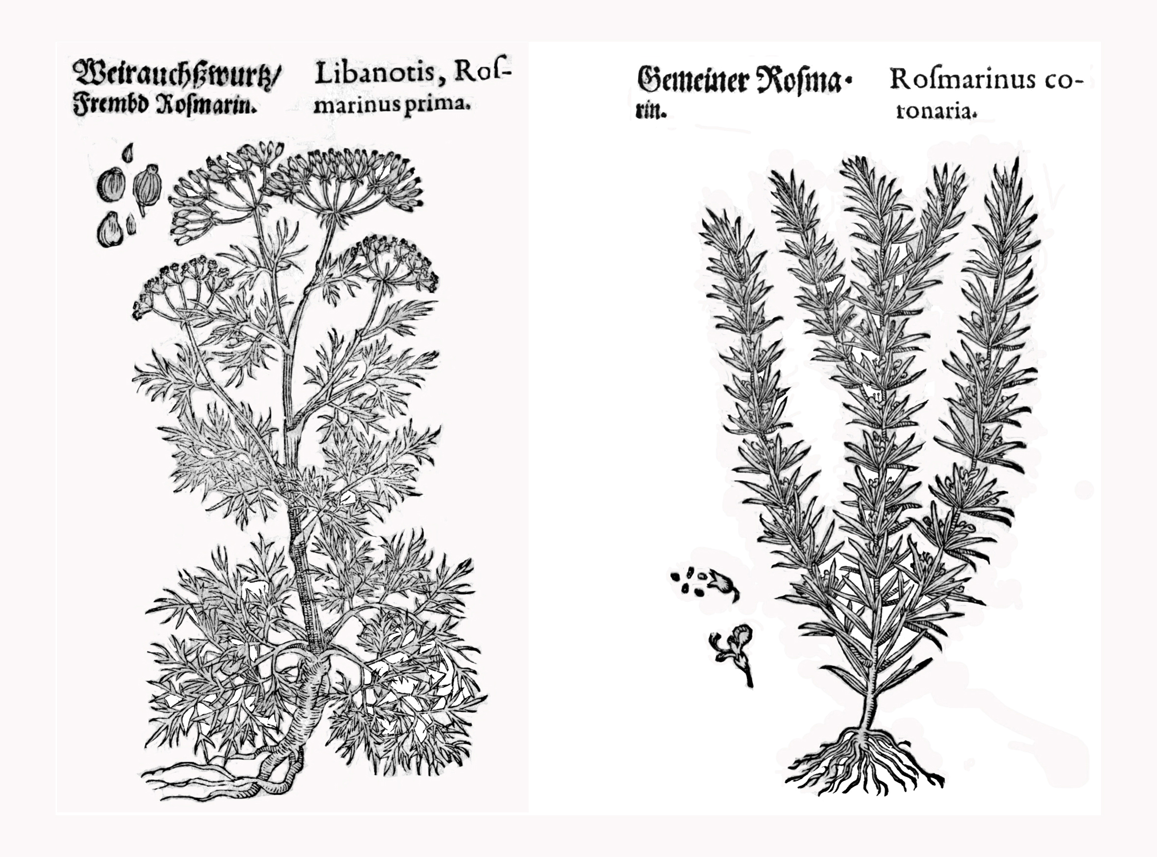 Abbildung von Libanotis und Rosmarinus